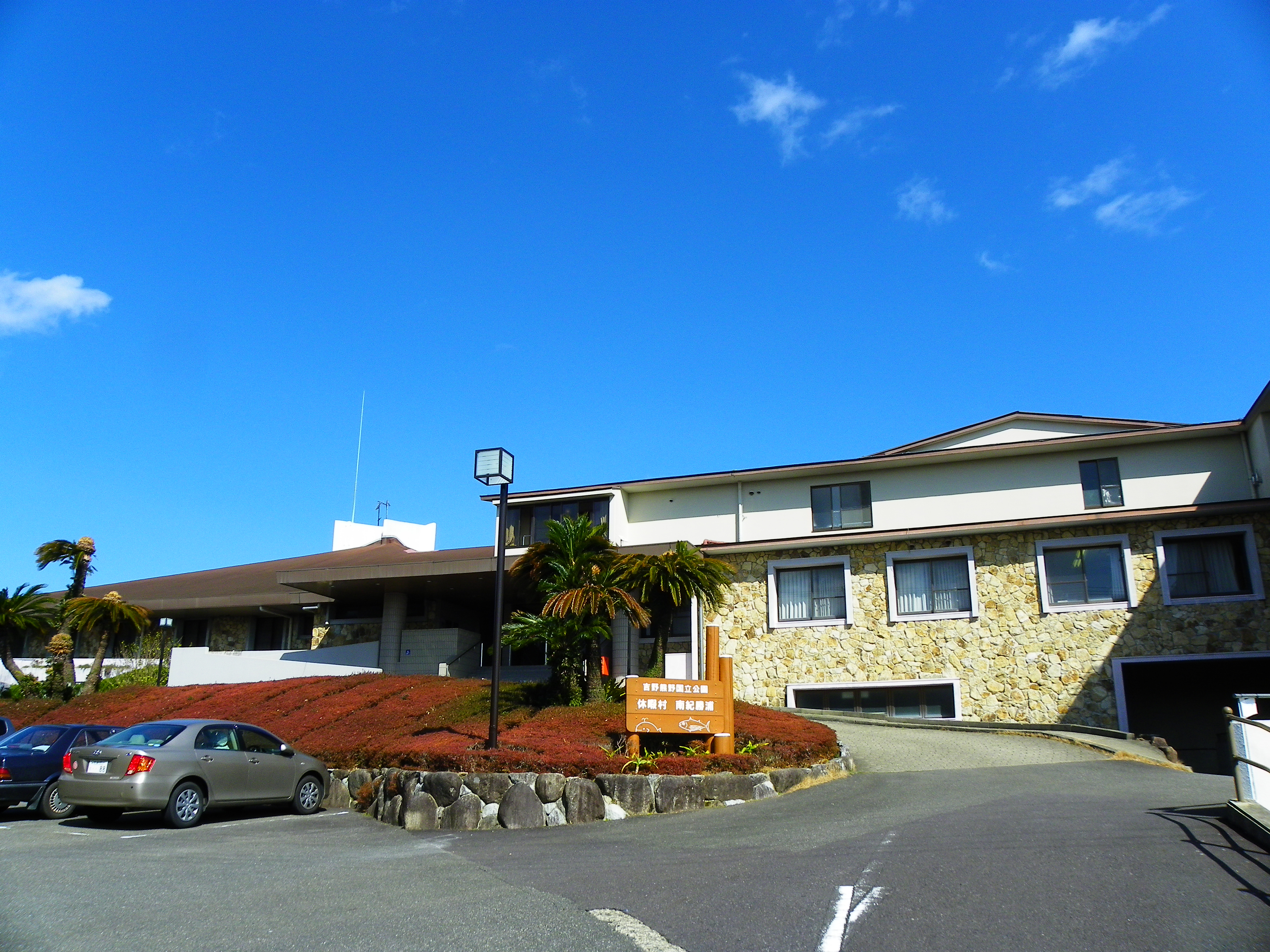 休暇村南紀勝浦、所在地：〒649-5312 和歌山県東牟婁郡那智勝浦町宇久井。